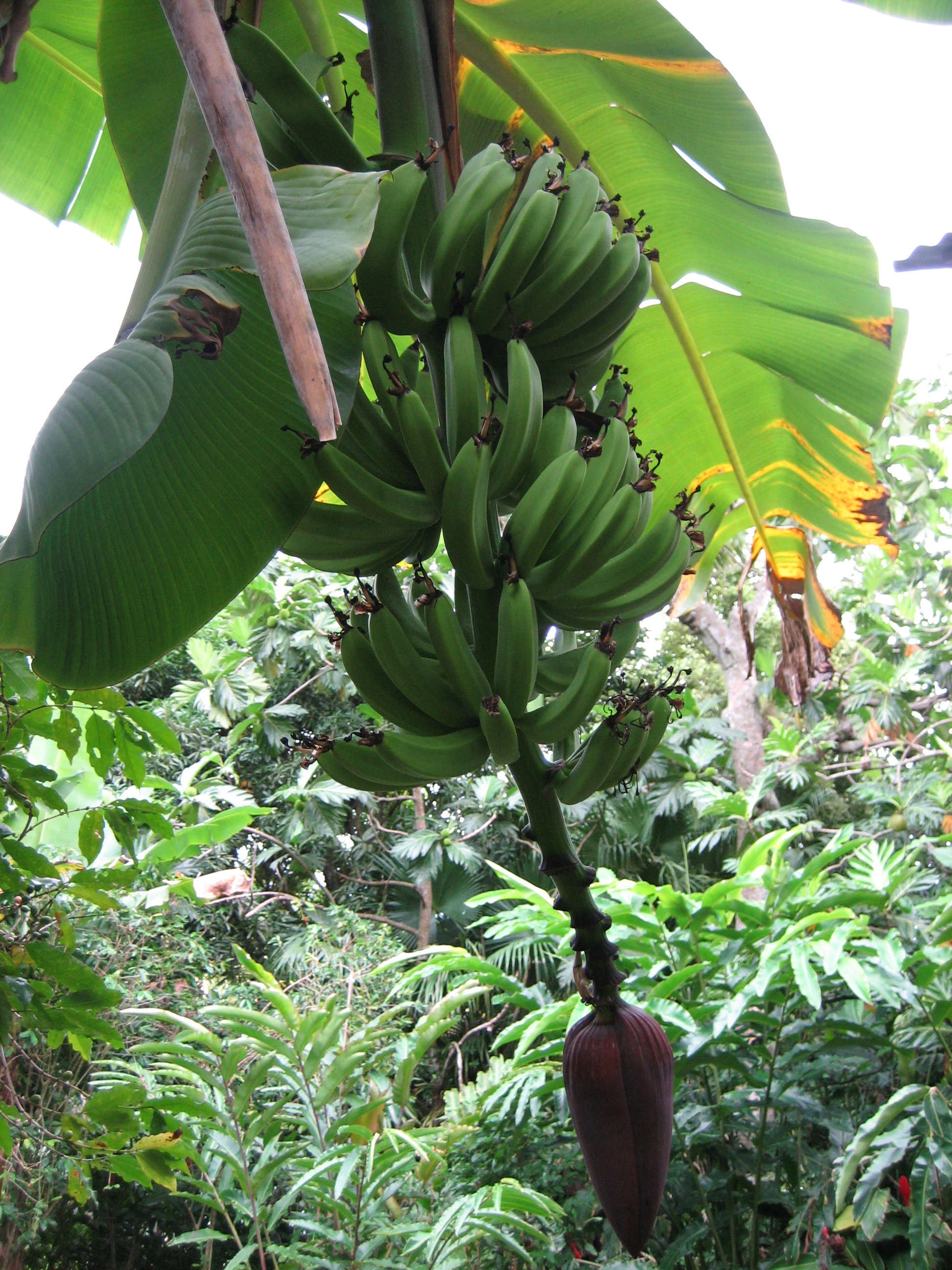 Régime de bananes